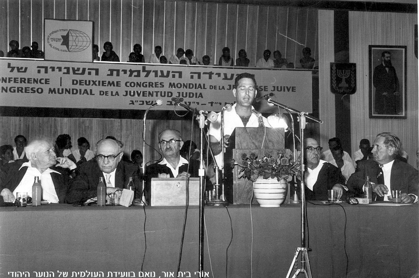 מימין - נחום גולדמן, לוי אשכול, אורי בית־אור, אליהו דובקין, זלמן שזר ודוד בן־גוריון ירושלים, 4.8.1963